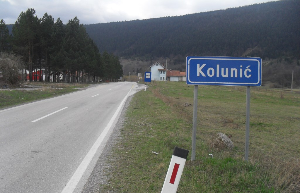 Улаз у Колунић из правца Босанског Петровца.